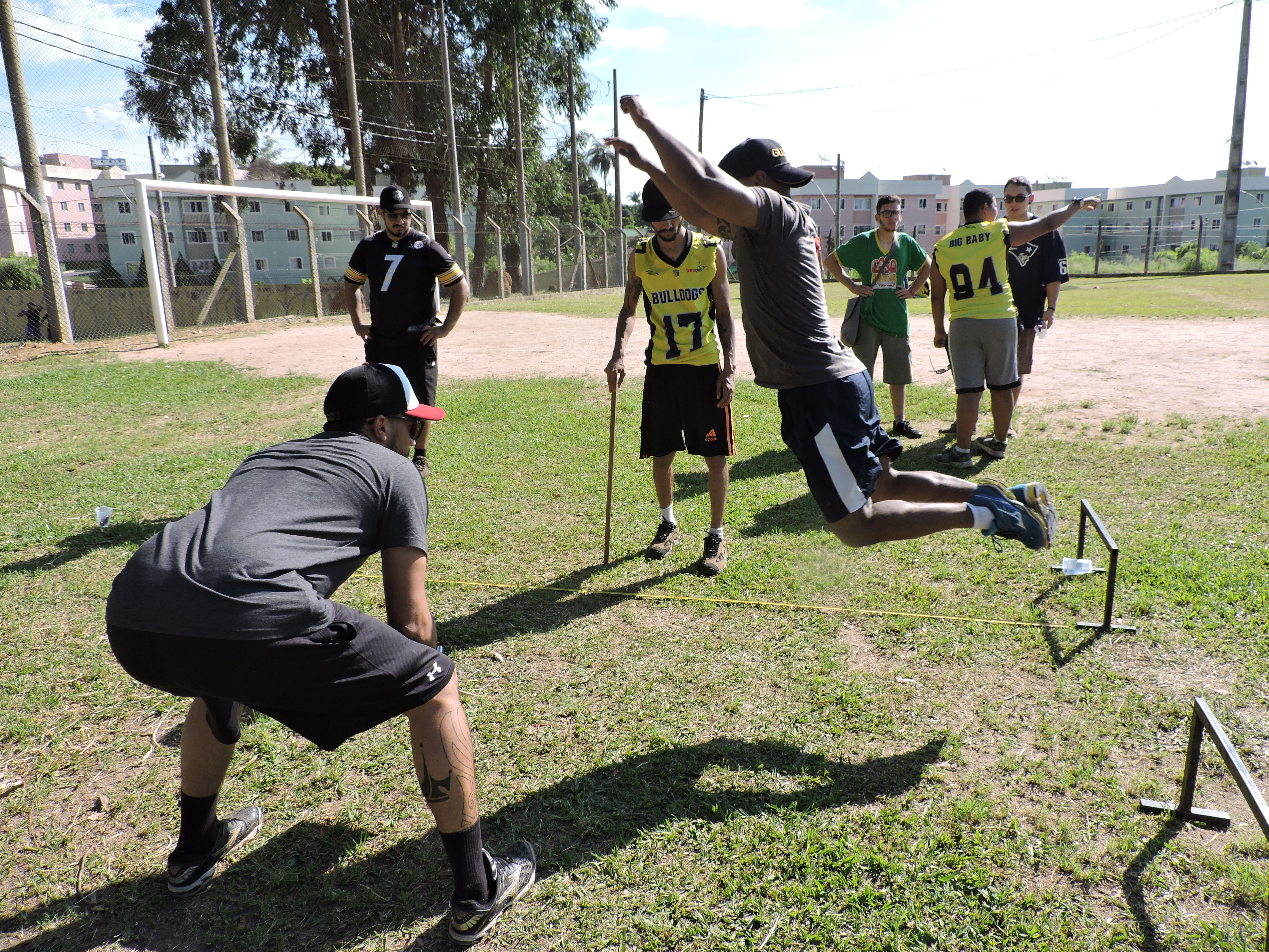 Seletiva Betim Bulldogs Futebol Americano